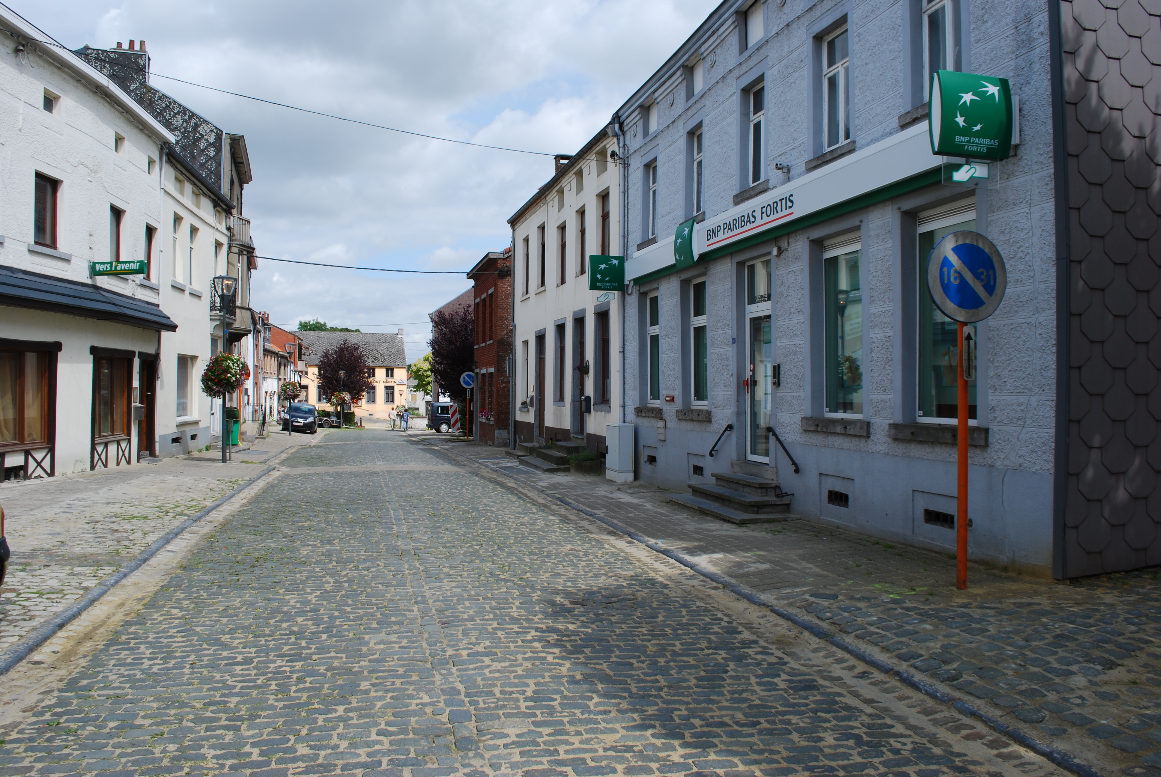 Vue de Marbais (Villers-la-Ville).